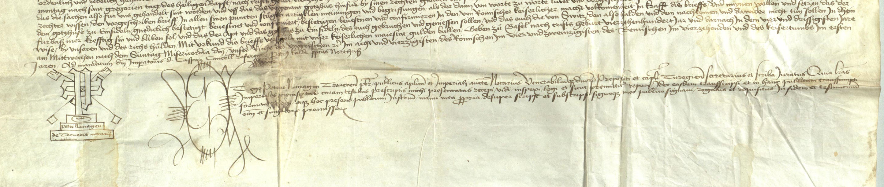 Vidimus der goldenen Bulle Kaiser Sigmunds vom Jahr 1434 für Kloster Einsiedeln, ausgestellt auf Bitte des Dekans Albrecht von Bonstetten durch den Notar Petrus Numagen